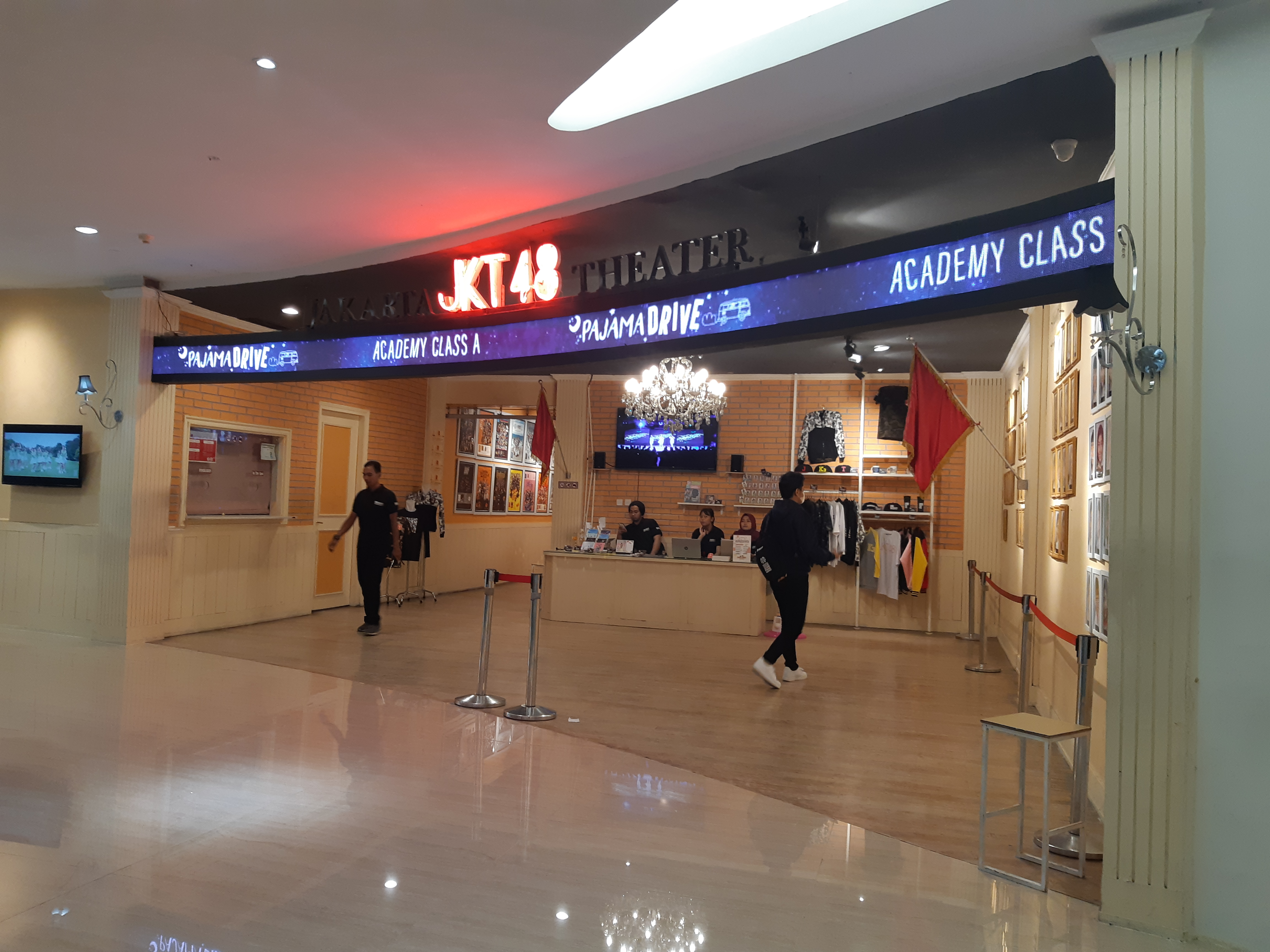 JKT48 Theater 2019